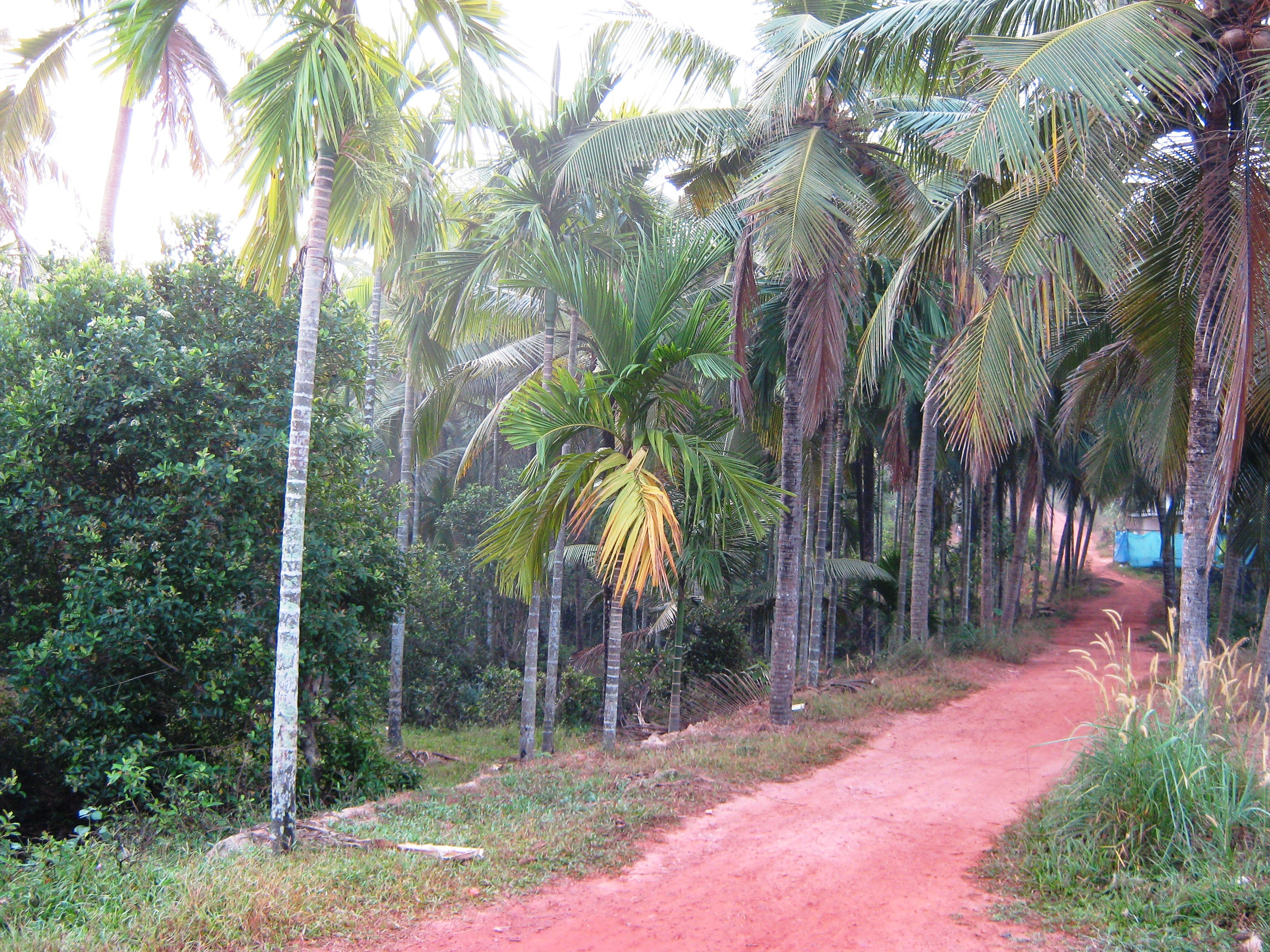 Kannur, Kerala, India.